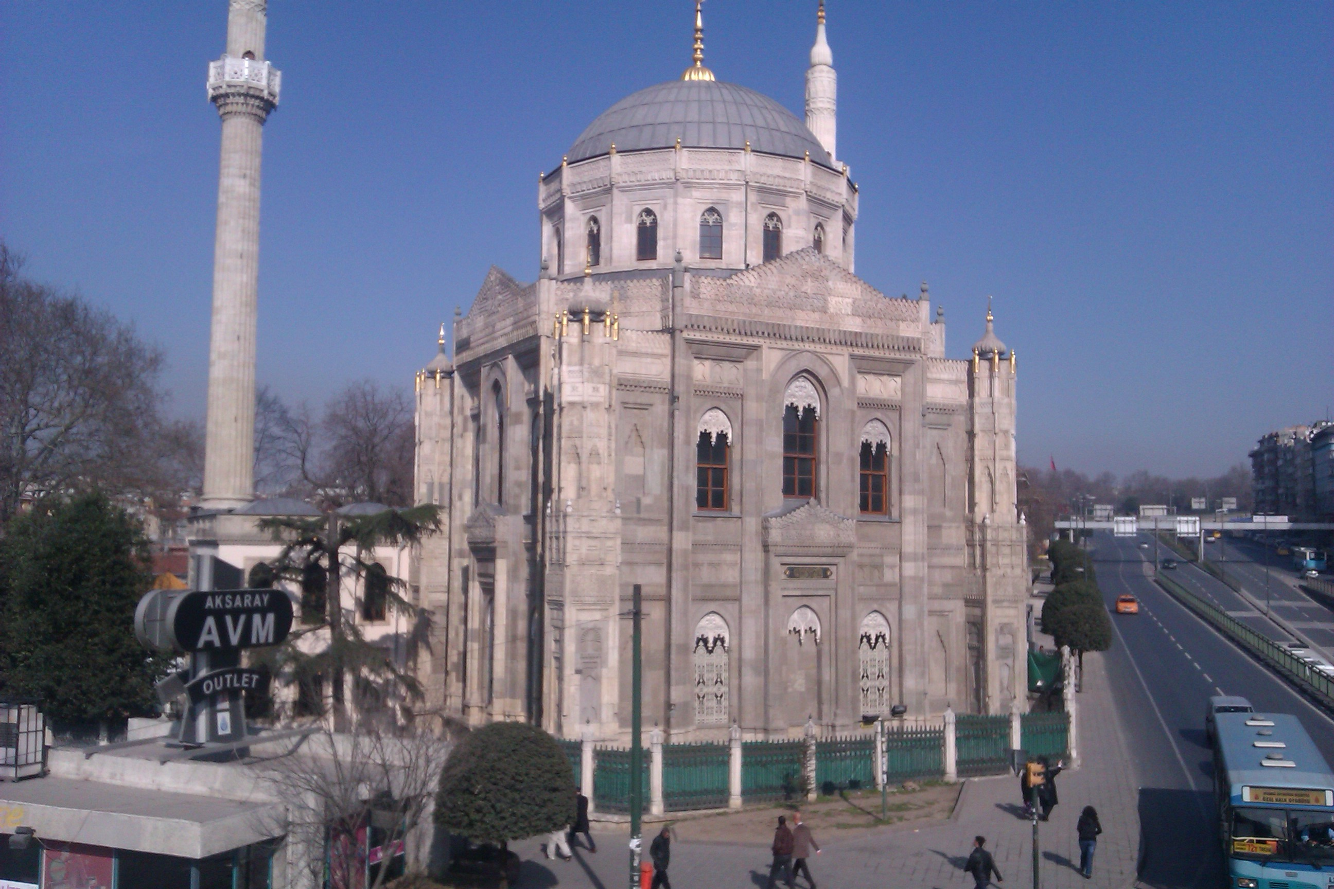 Pertevniyal Valide Sultan Mosque 2